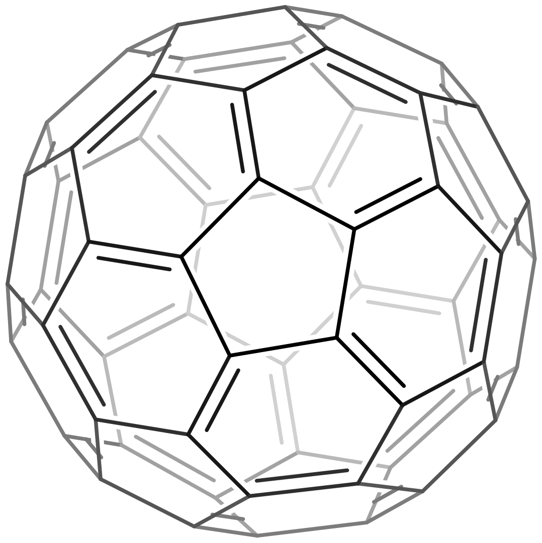 Buckminsterfullerene